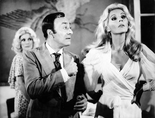 Contenido: Fotografía blanco y negro sobre papel fotográfico brillante. Escena en la que aparecen en primer plano Susana Giménez de frente, con las manos en la cintura y Alberto Olmedo mirándola, los dos de medio cuerpo. Detrás Gilda Lousek mirándolos..